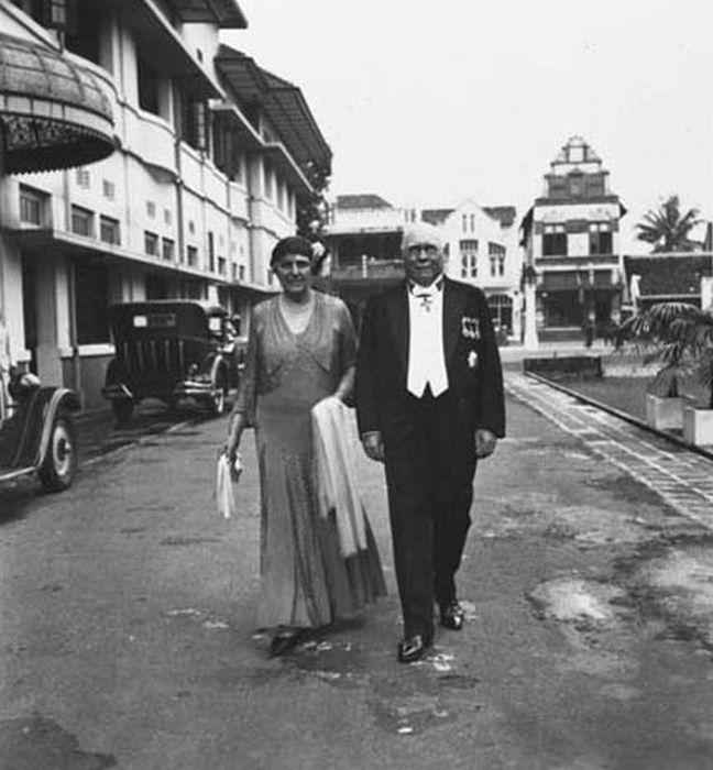 Tuan dan nyonya Vattier Kraane berangkat menuju perjamuan oleh gubernur Yogyakarta di Grand Hotel (sekarang Hotel Garuda), Jalan Malioboro